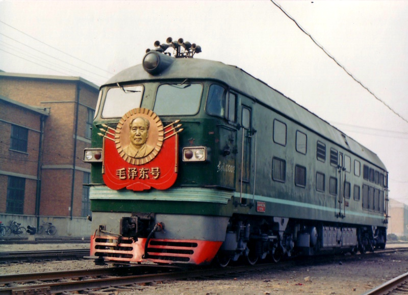 1977年2月，配属北京铁路局丰台机务段的东风4型0002号机车被命名为“毛泽东号”，替换了上一代的解放1型304号蒸汽机车（ㄇㄎ1-304），成为第二代“毛泽东号”机车。1991年8月，东风4B型1893号机车接替了东风4型0002号机车，成为第三代“毛泽东号”。东风4型0002号机车除名后改为丰台机务段调车机车。2008年12月19日，东风4型0002号机车根据铁道部电报令报废；而机车报废之后一直封存于丰台机务段至今。